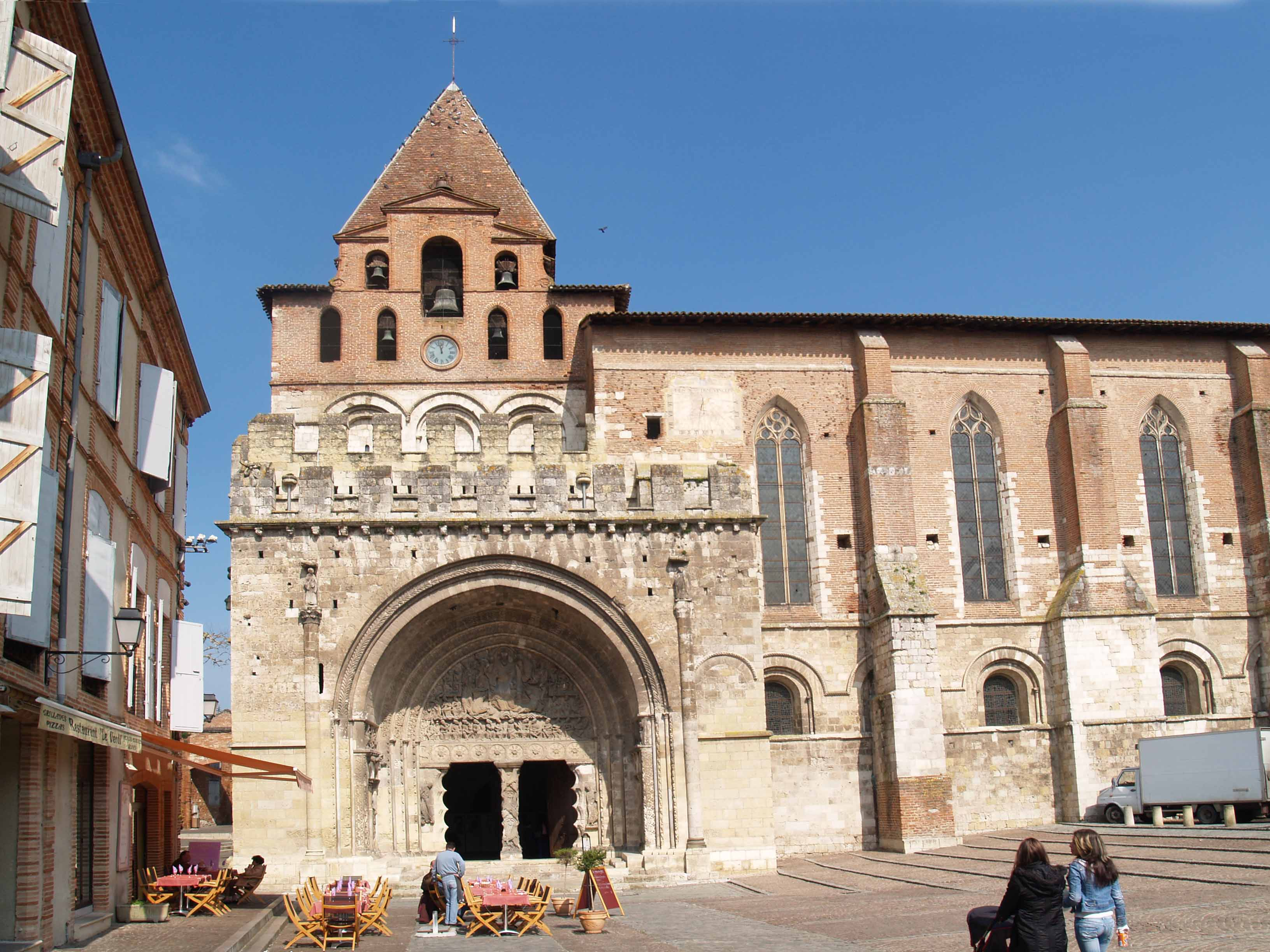 Abbaye Saint Pierre de Moissac Façade Photo personnelle Bertrand Bouret